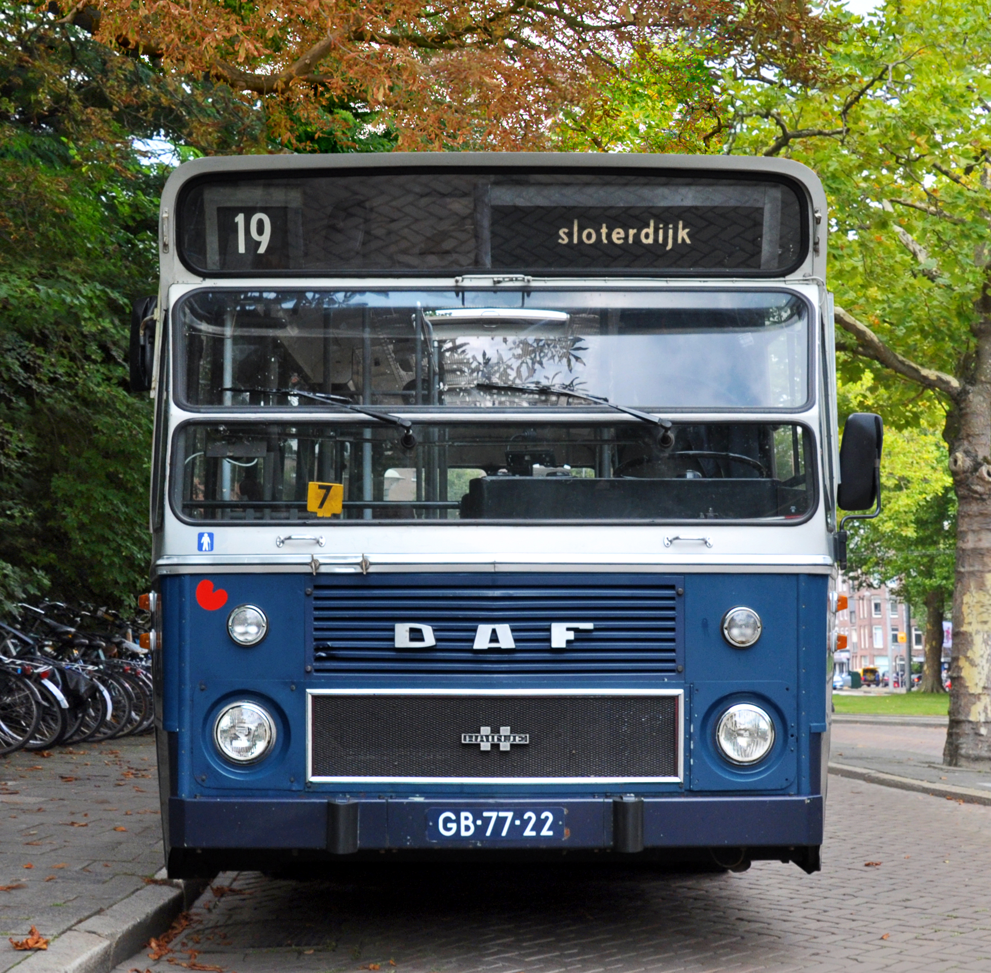 De DAF-HAINJE ex. GVB 110 was te zien tijden een open dag van de Stichting Electrische Museumtramlijn Amsterdam (EMA) aan de Havenstraat in Amsterdam 2017.